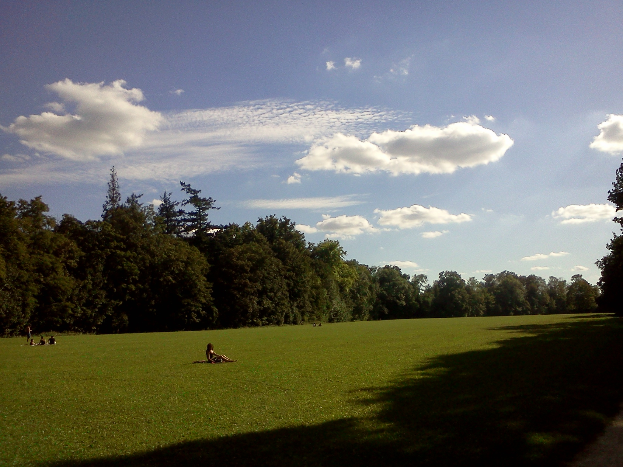 Pelouse de la ville de St-Pierre du Perray